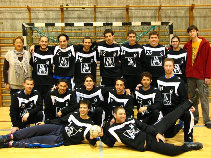 Asa B.G. Handball